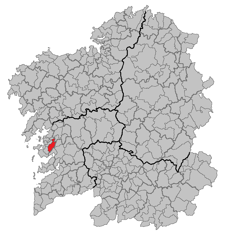 Mapa coa localización do concello de Meis.